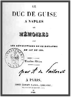 Титульный лист романа Амеде-Дэвида маркиза де Пасторе "Герцог де Гиз в Неаполе"